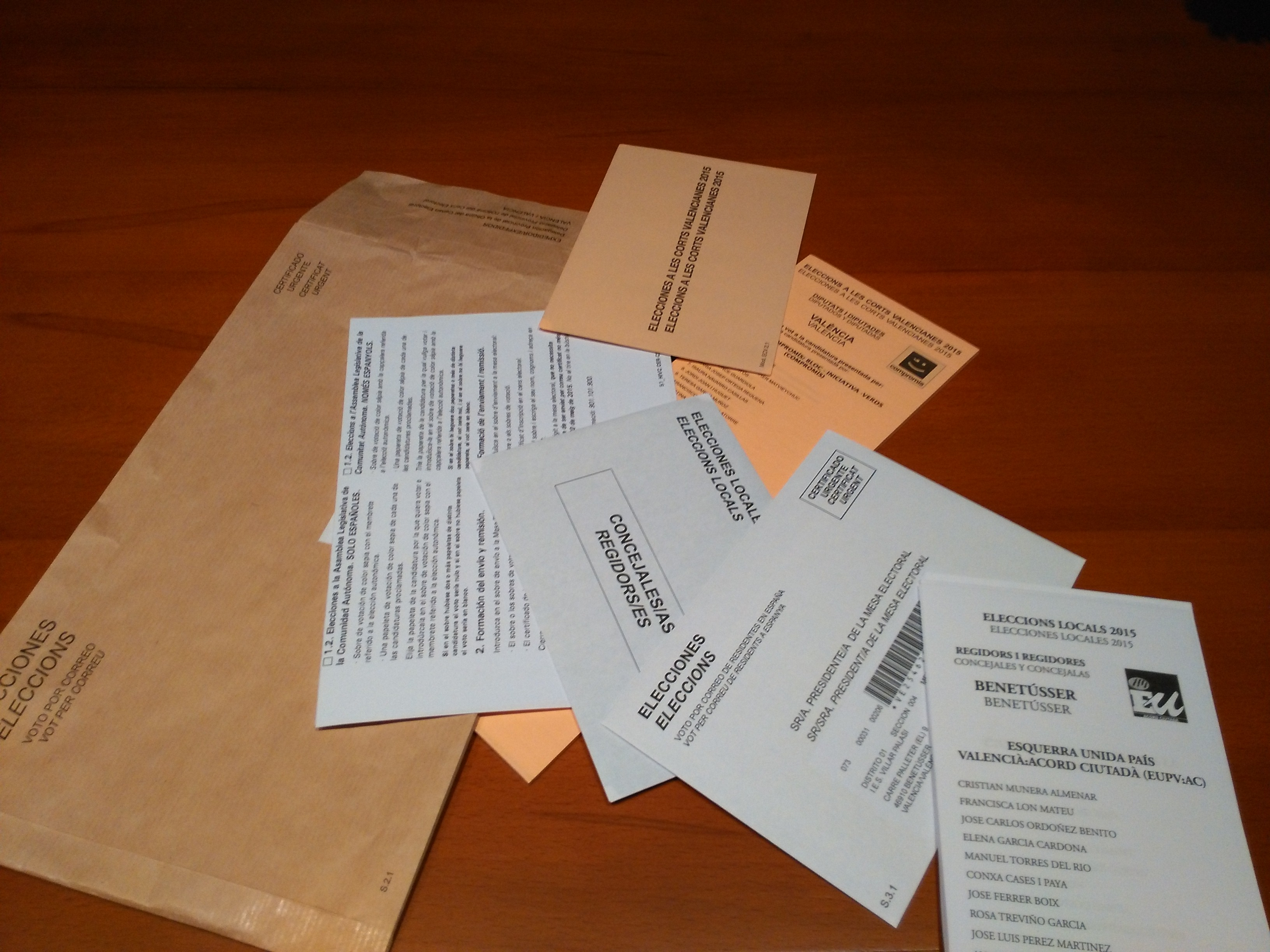 Set para votar por correo a las elecciones a las Cortes Valencianas y locales de Benetússer de 2015.